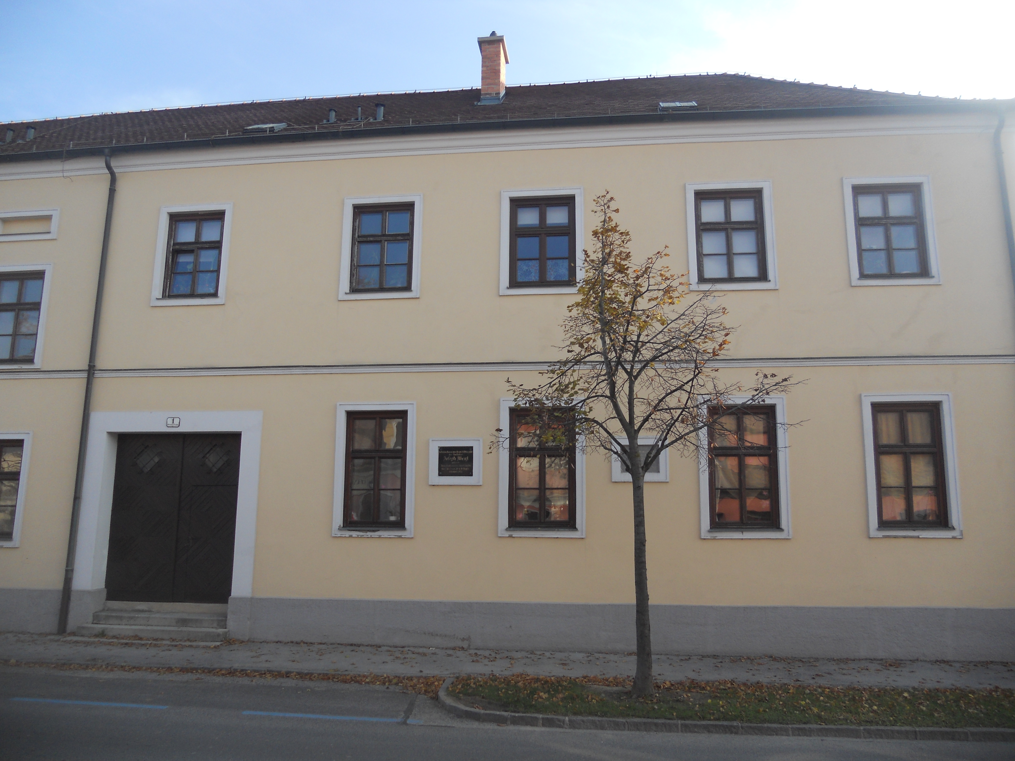 Margaretinum in Eisenstadt- Oberberg